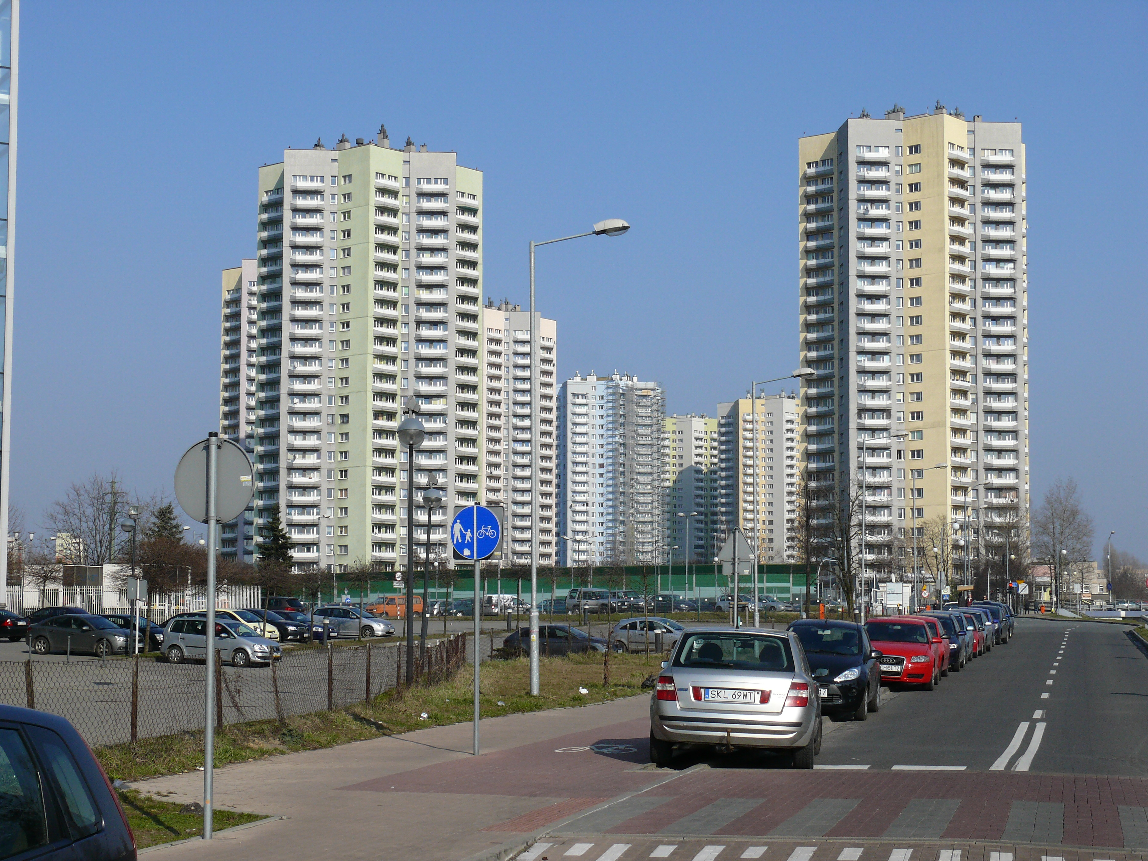 Das "Osiedle Rozdzienskiego" in Kattowitz, einem Pulk aus 7 Hochhäusern genannt "Gwiazdy" (Sterne).